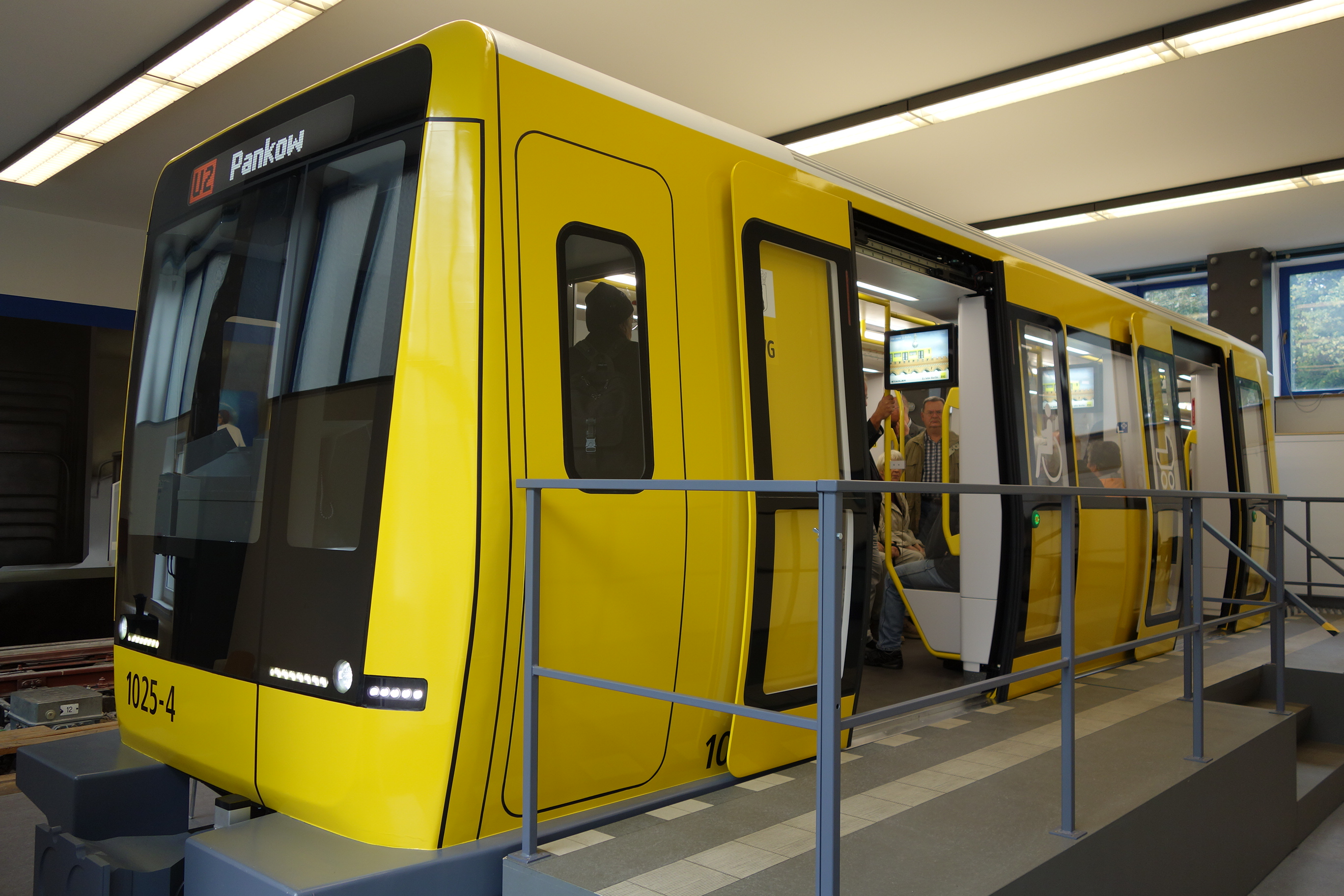 U-Bahn Berlin, Mock-Up eines U-Bahnwagens Typ IK